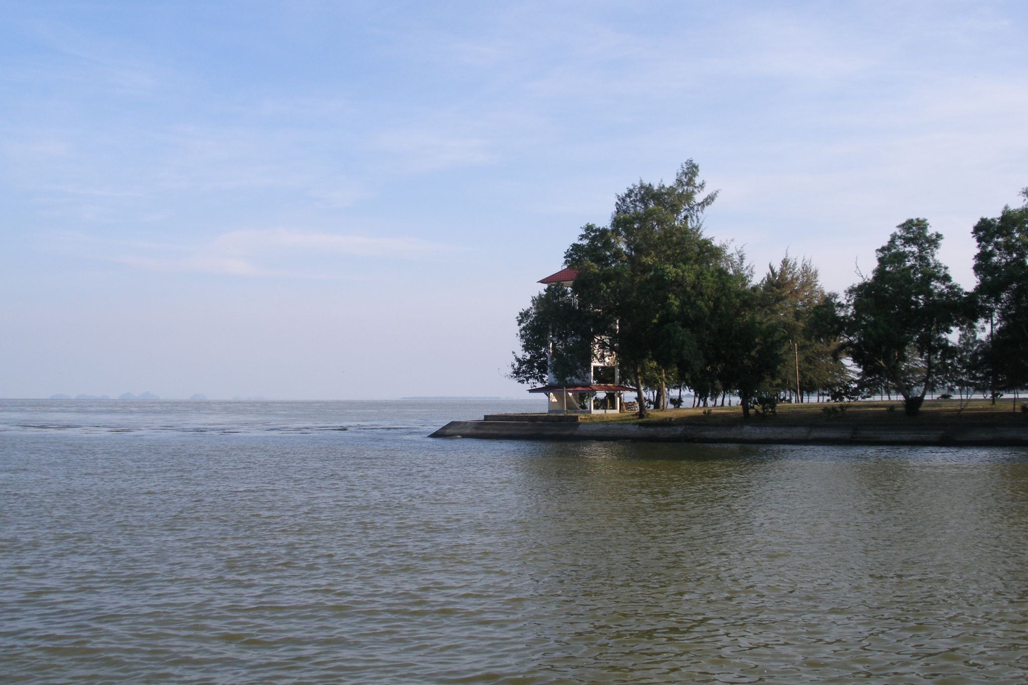 Songkhla Lake, Thailand.